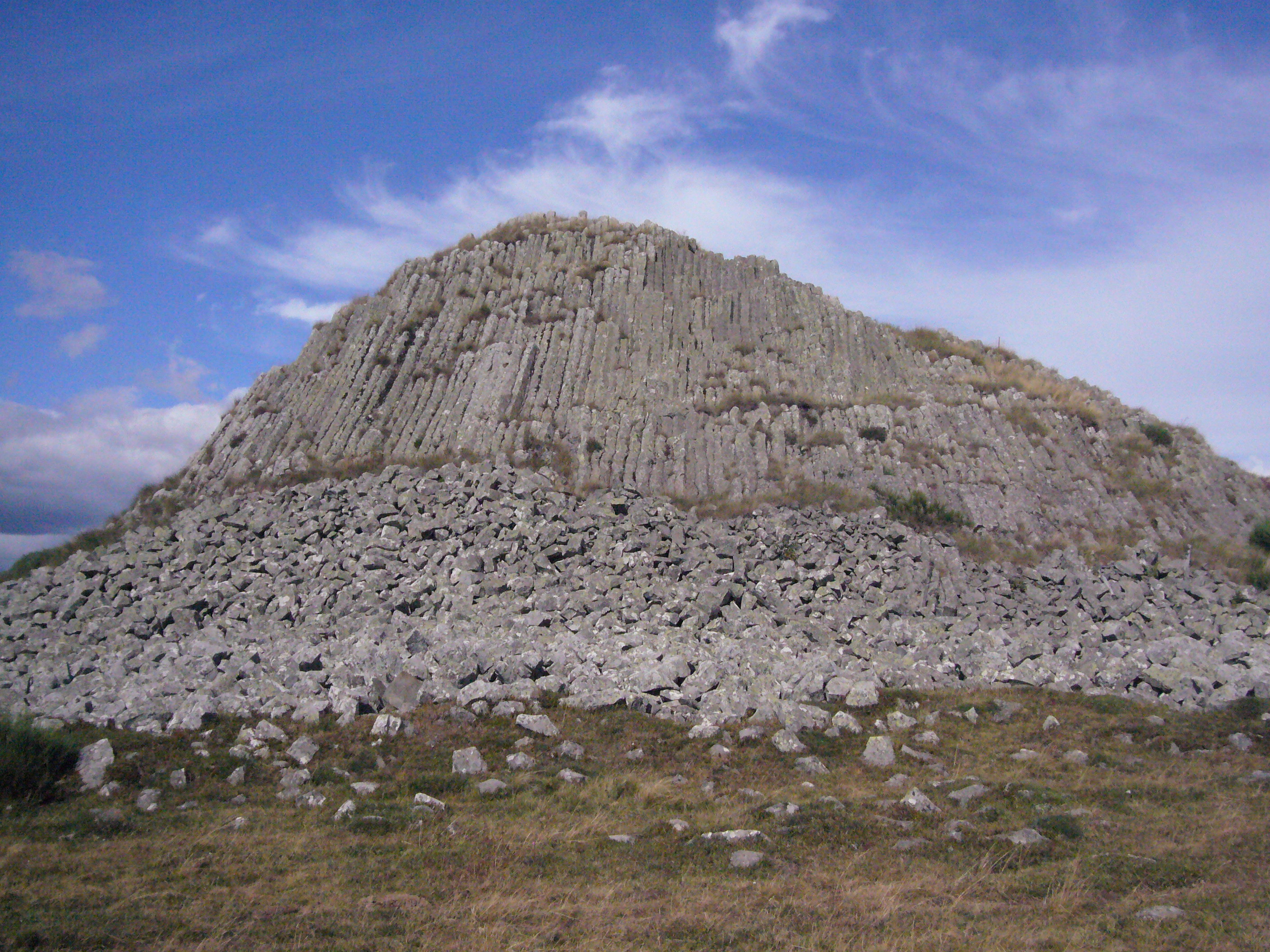 Le truc des Coucuts (1286 m). Rocher volcanique sur la commune de prinsuéjols (Lozère).